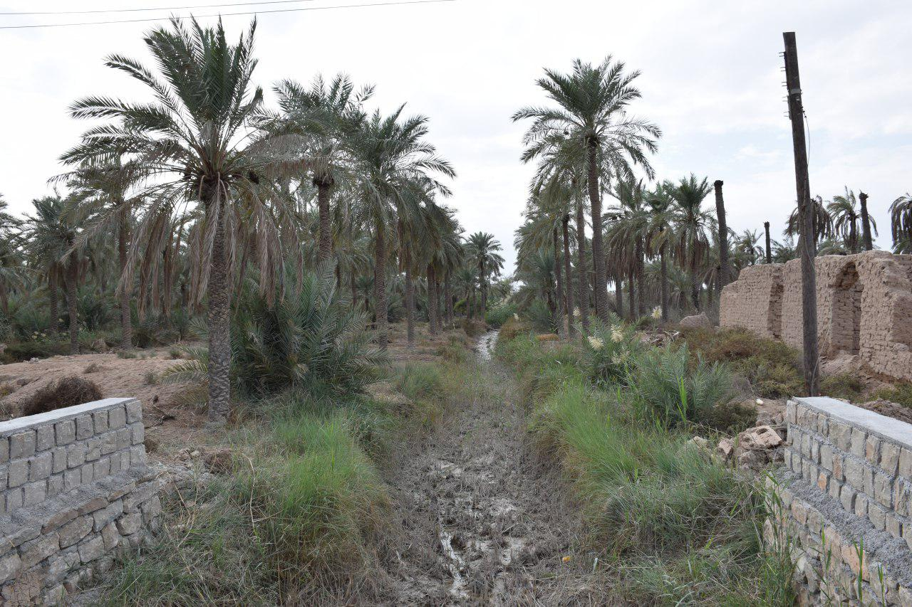 نخلستان های روستا امام حسن عسگری